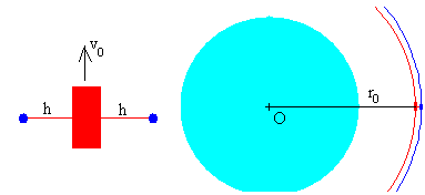 Relativo